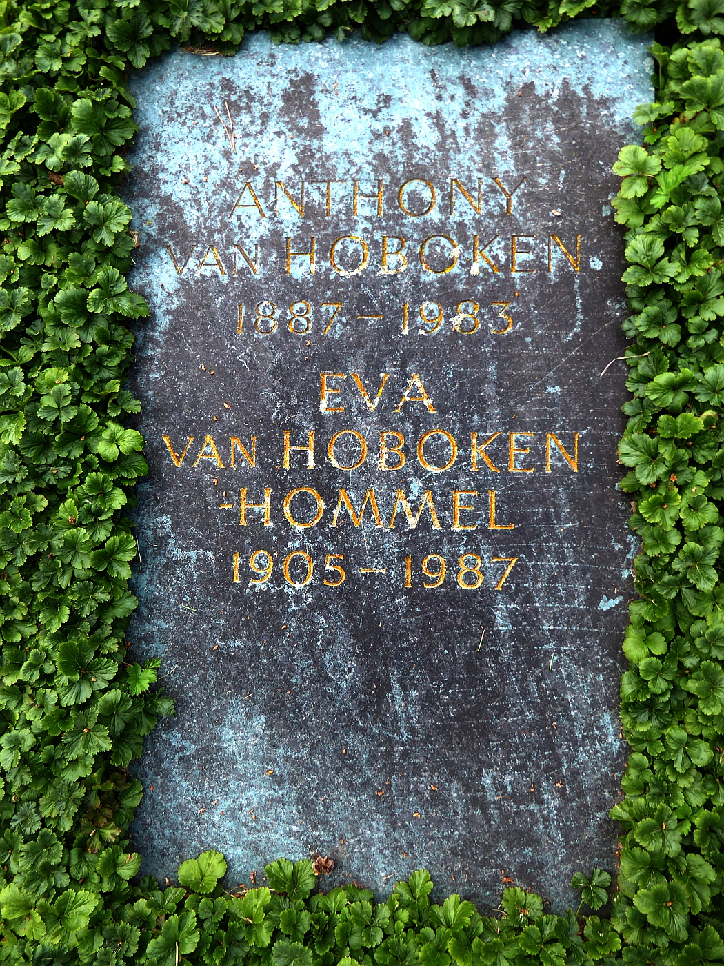 Eva van Hoboken-Hommel (1905–1987) Tänzerin, Schriftstellerin. Grab auf dem Friedhof Witikon, Zürich